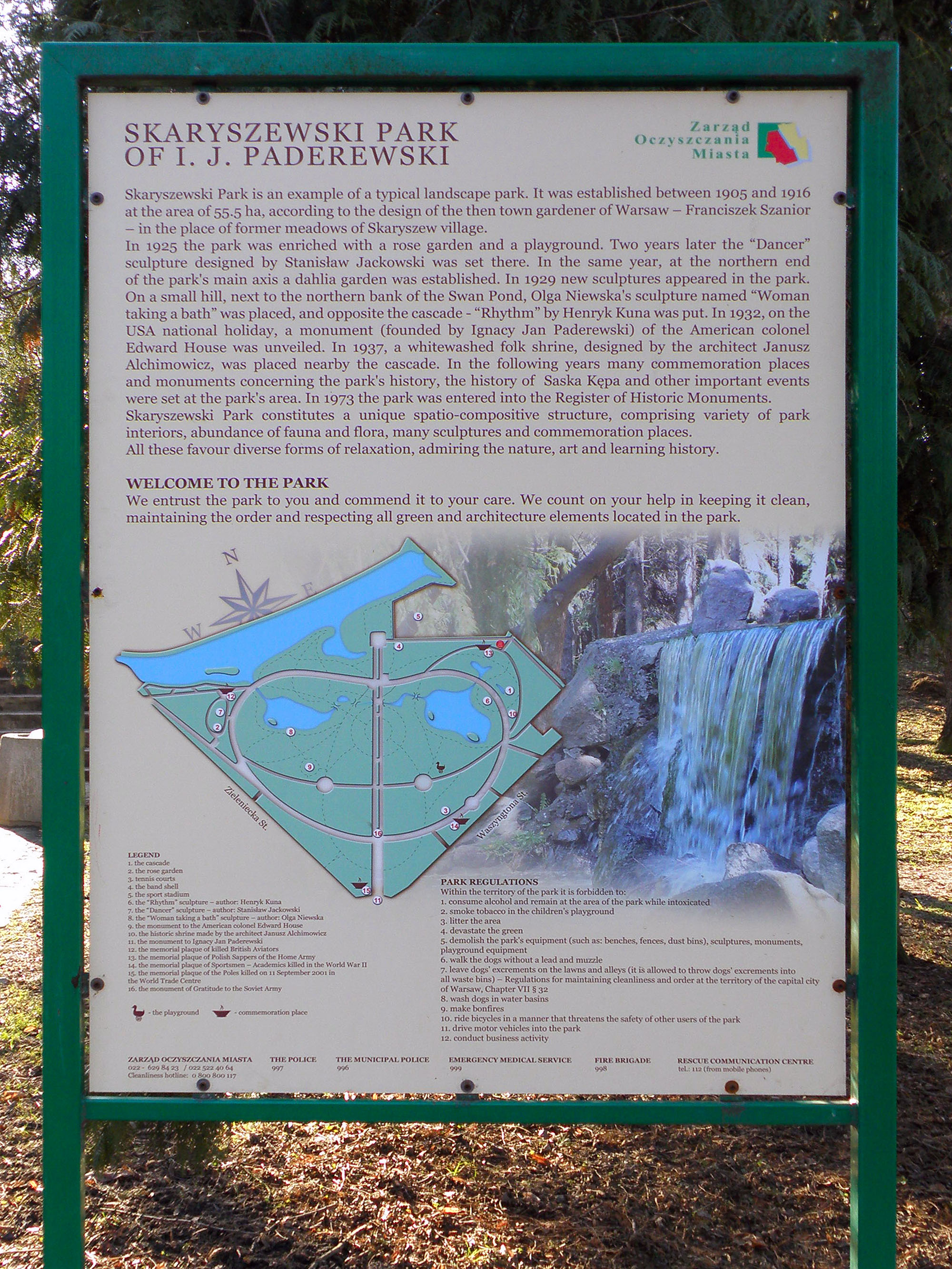 Warszawa, Park Skaryszewski